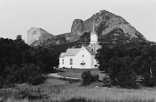 Rødøy kirke fra 1885